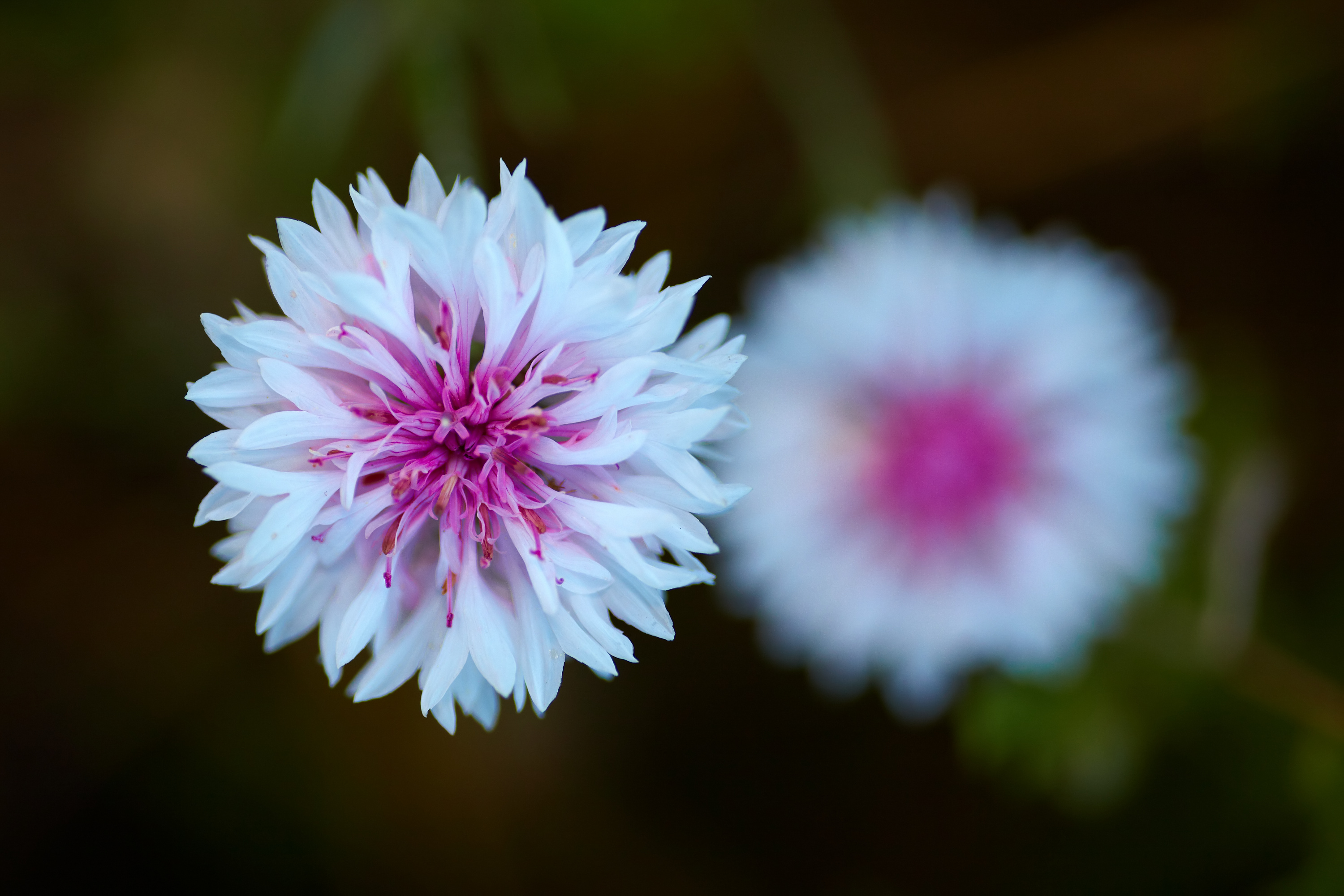 Centaurea cyanus